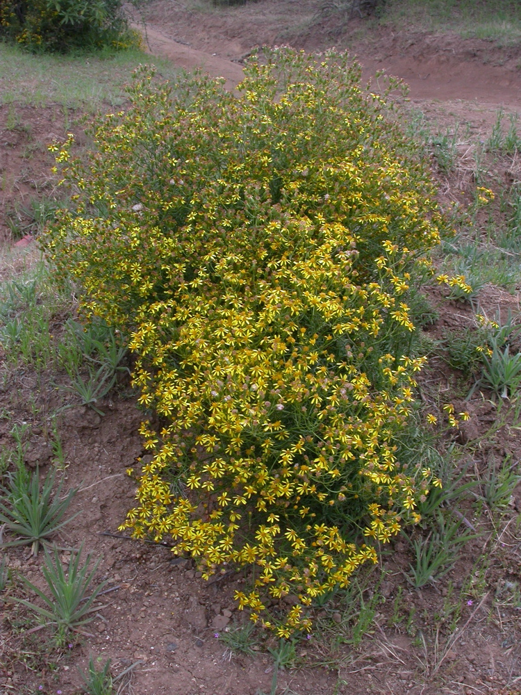 Senecio invalidus